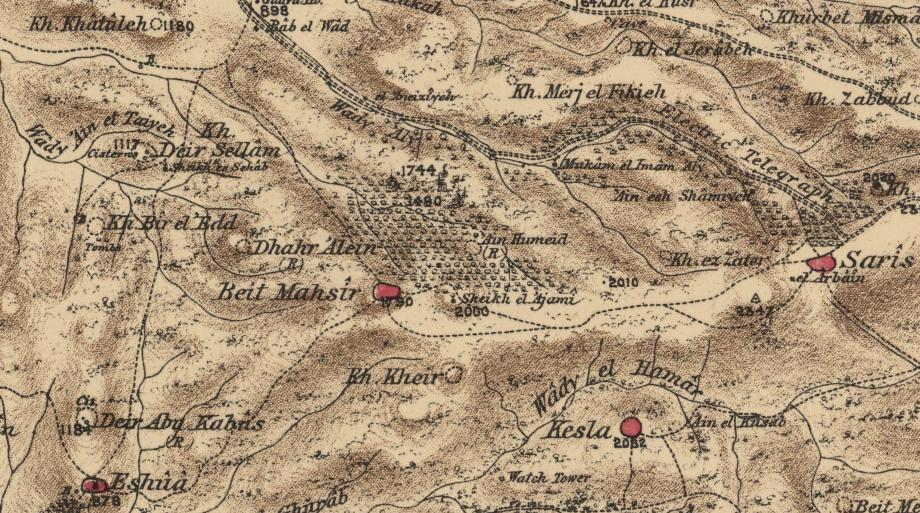 מפת בית מחסיר משנת 1880 PEF